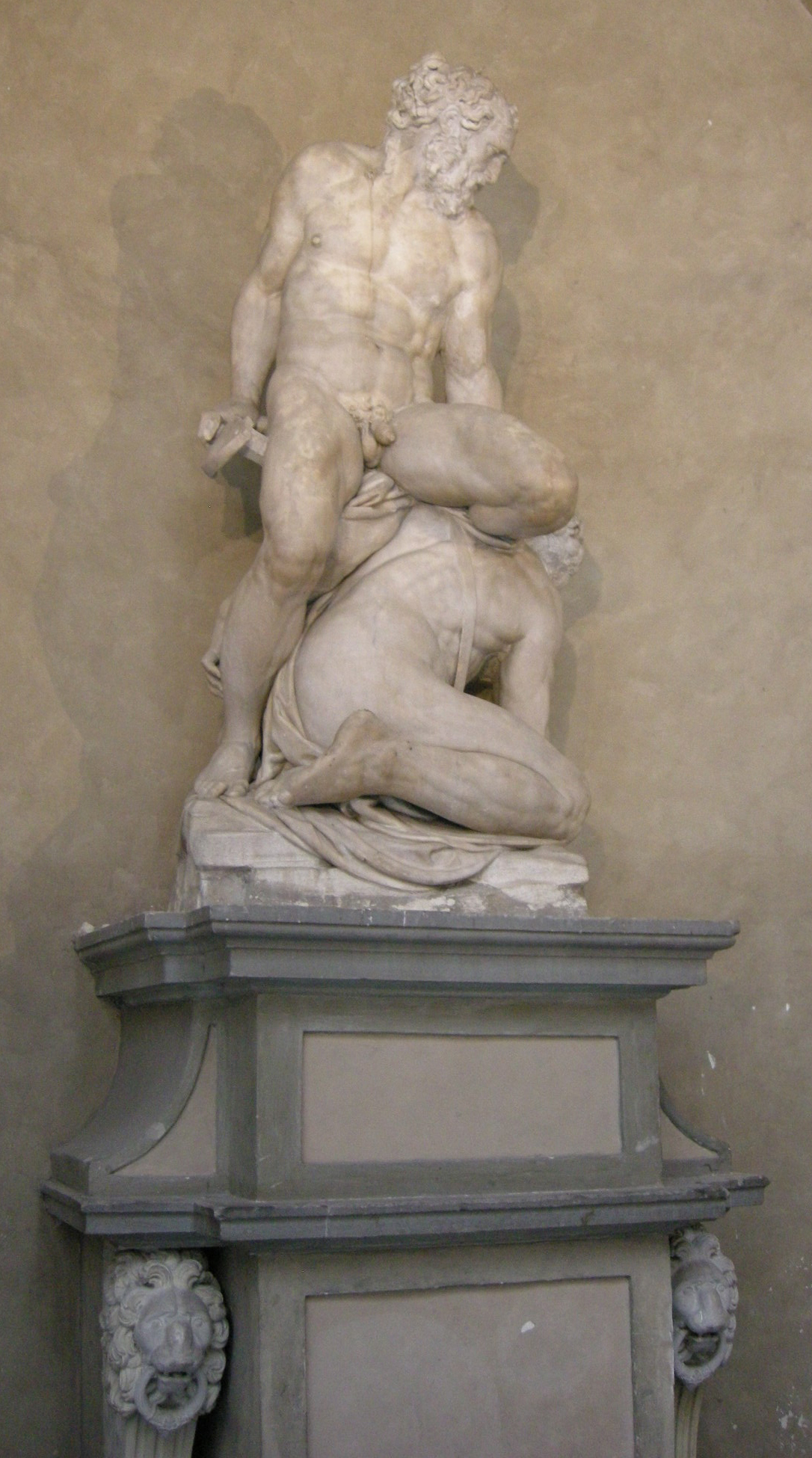 Cortile di michelozzo, sansone e il filisteo di pierino da vinci